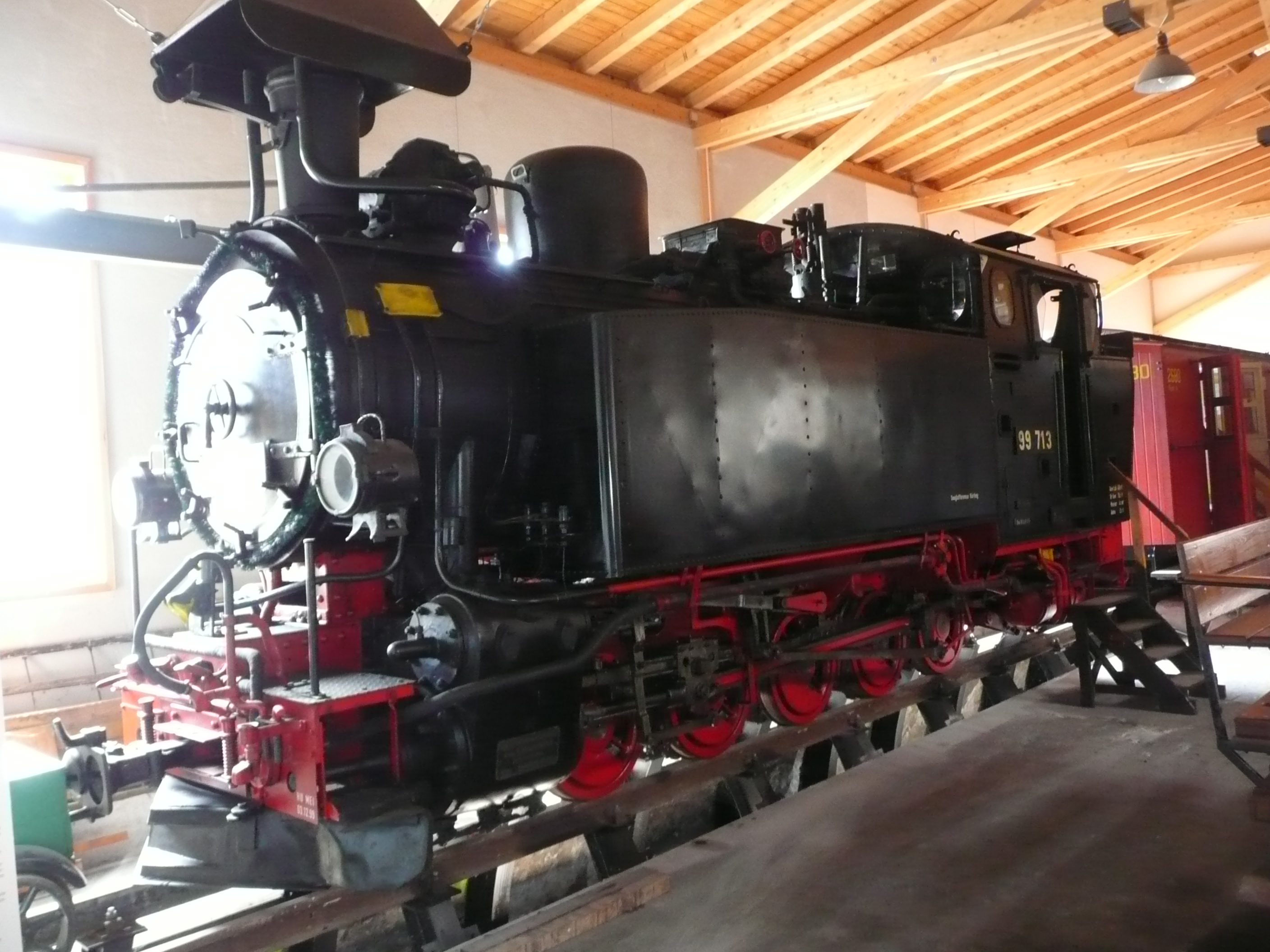 99 713 unterstellt im Lokschuppen Wilsdruff